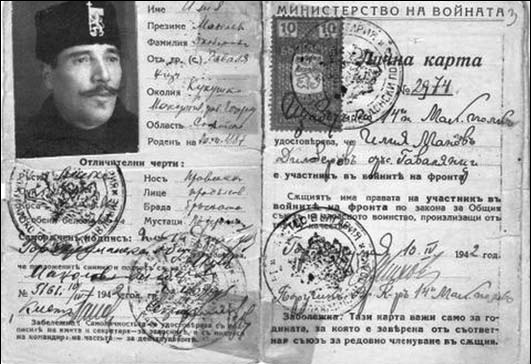 Лична карта на Илия Дилберов.